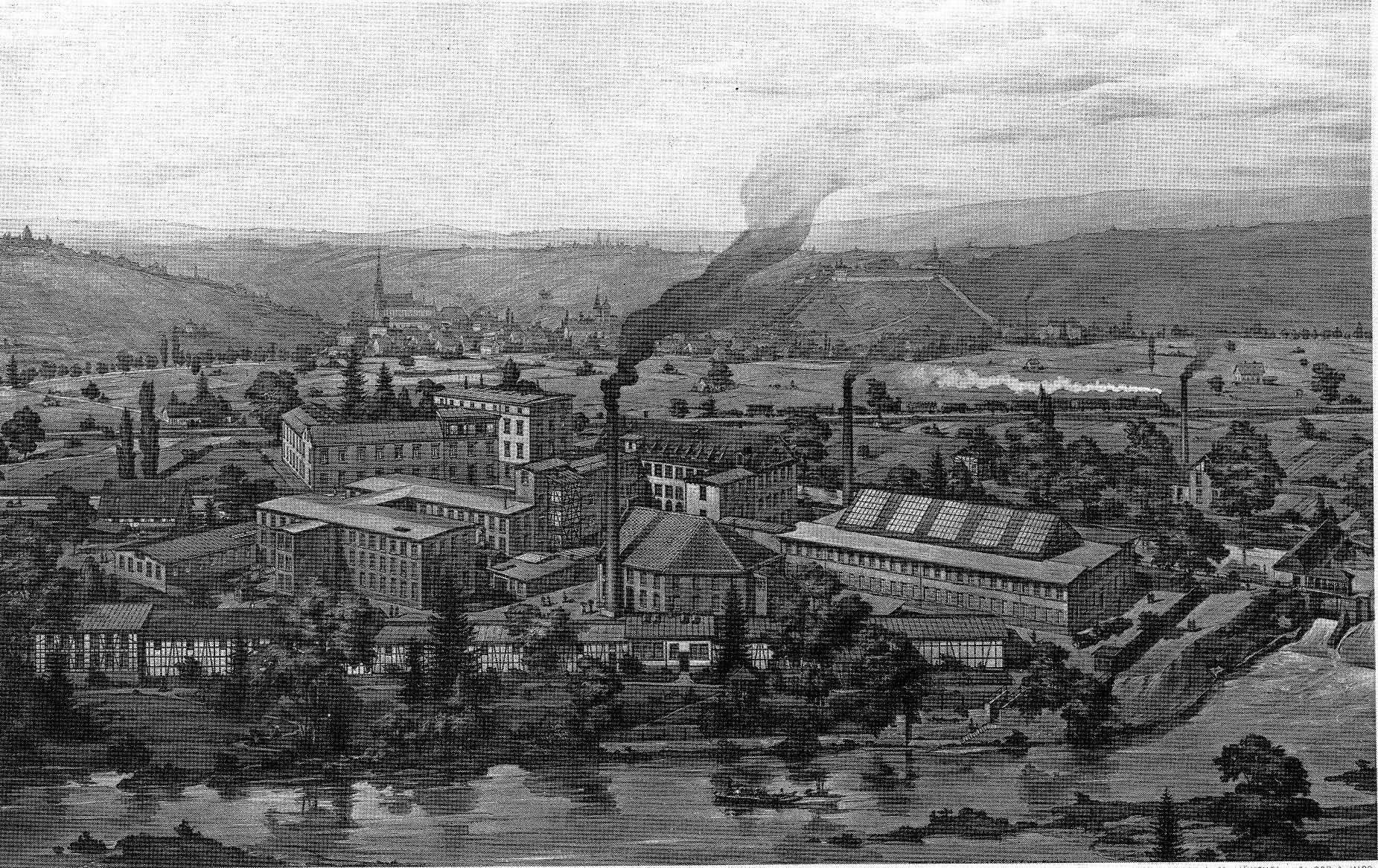 Firma Deffner